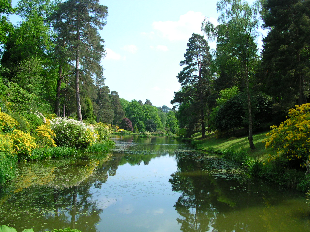 Leonardslee Gardens, Lower Beeding, West Sussex, England